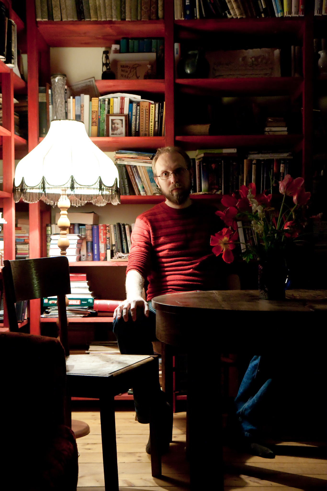 Teoloog Meelis Friedenthal oma kodus Supilinnas.